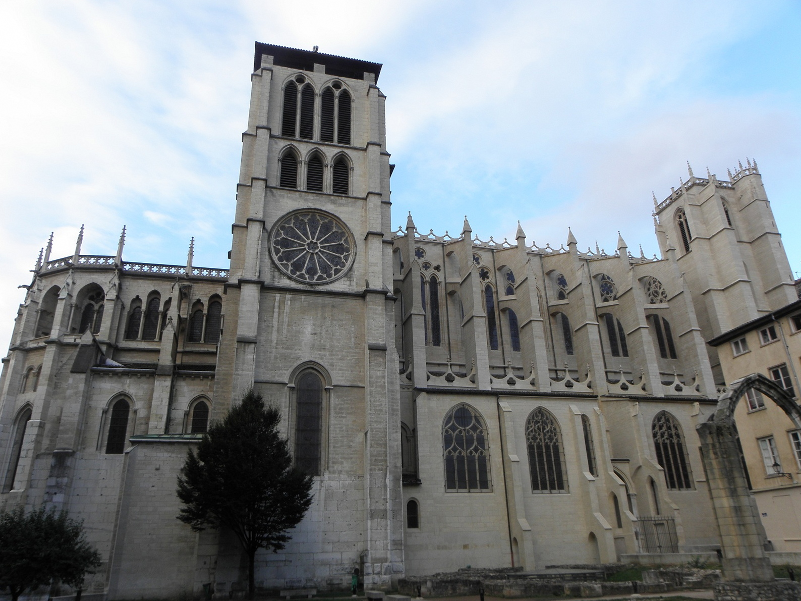 Flanc nord de la Primatiale Saint-Jean-Baptiste de Lyon (69). .